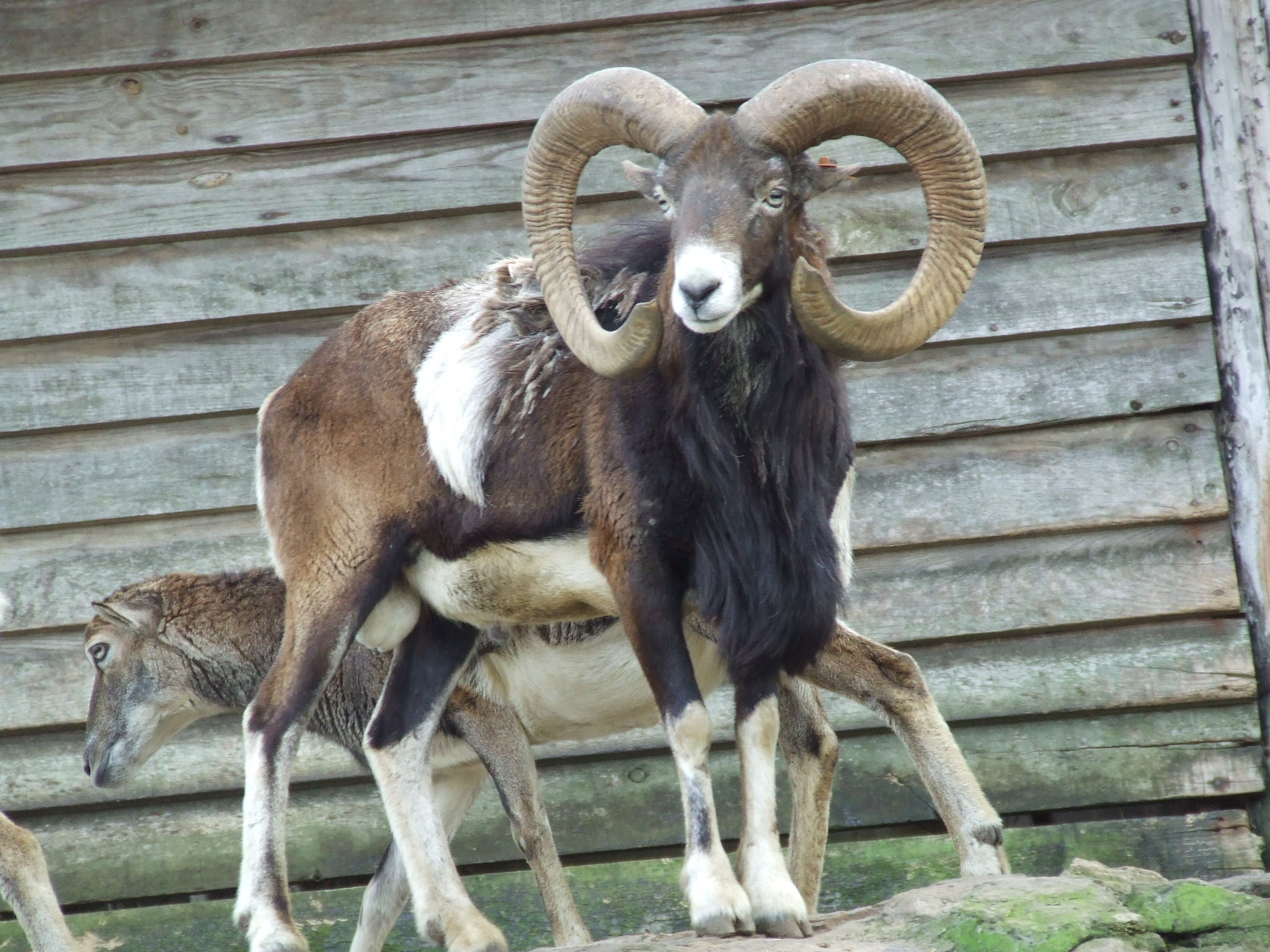 Muflón en el Zoo de Vigo, Galicia.